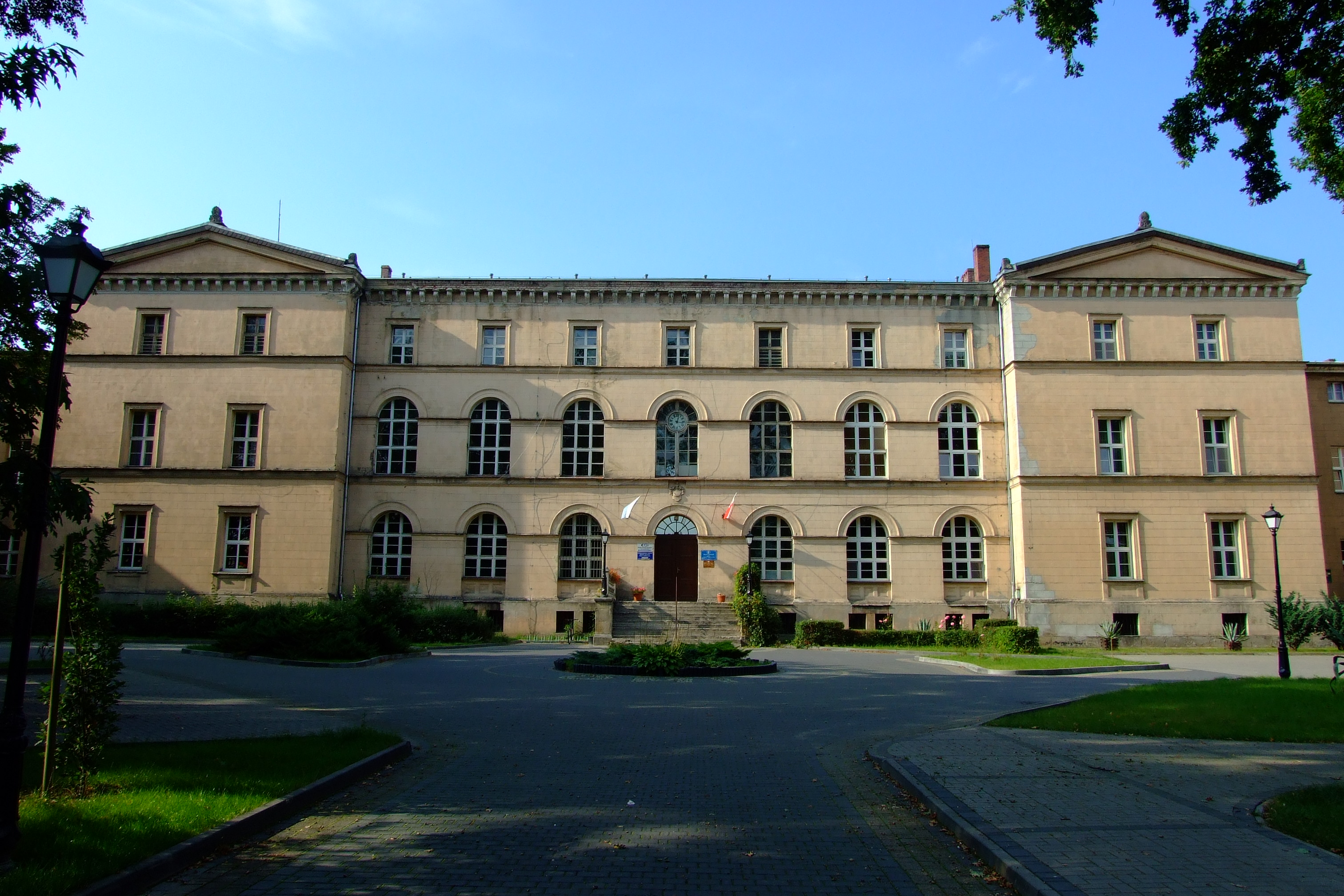 Lubliniec, ul. Józefa Piłsudskiego 6 - dawny Zakład Wychowawczy im. Grotowskiego otwarty w 1848 roku, od 1922 roku Niższe Seminarium Duchowne Księży Oblatów, obecnie Zespół Szkół im. św. Edyty Stein.